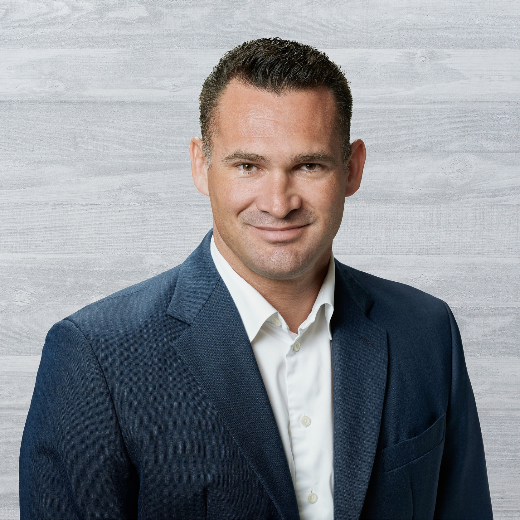 Marcel Dobler 2019